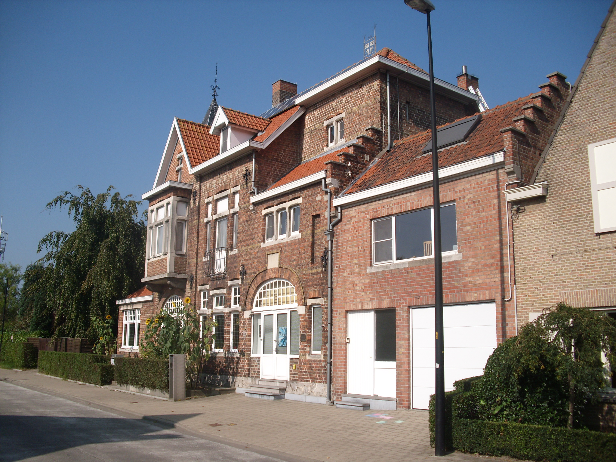 Duimpjesvilla, gebouwd door Victor De Lille - 1903 - Stationsplein 3 - Maldegem - Oost-Vlaanderen - België